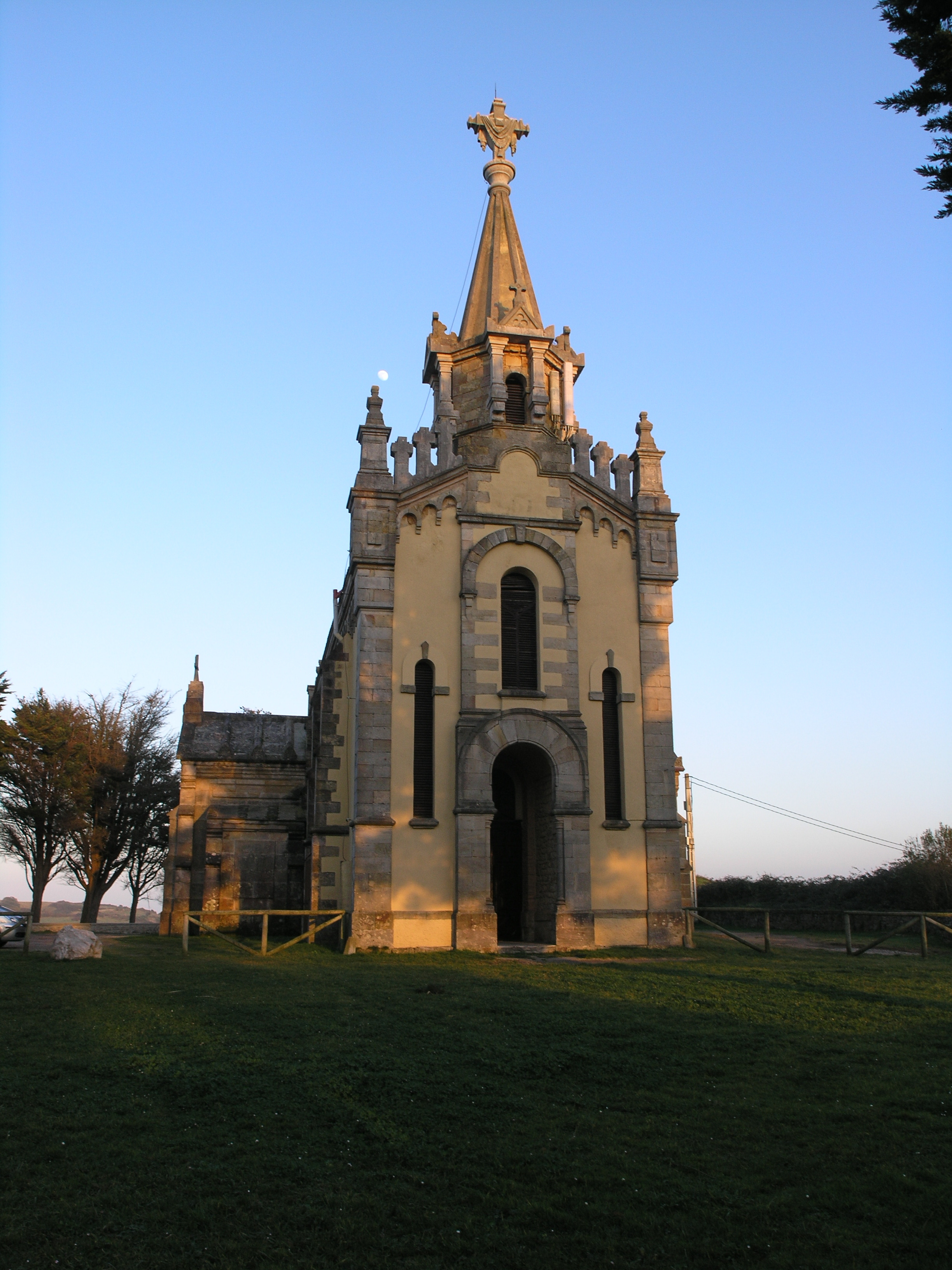 Ermita de la Virgen de los Remedios, cerca de Liandres, en el municipio de Ruiloba, en Cantabria, España. Construcción moderna (siglo XX) obra del arquitecto Casimiro Pérez de la Riva.